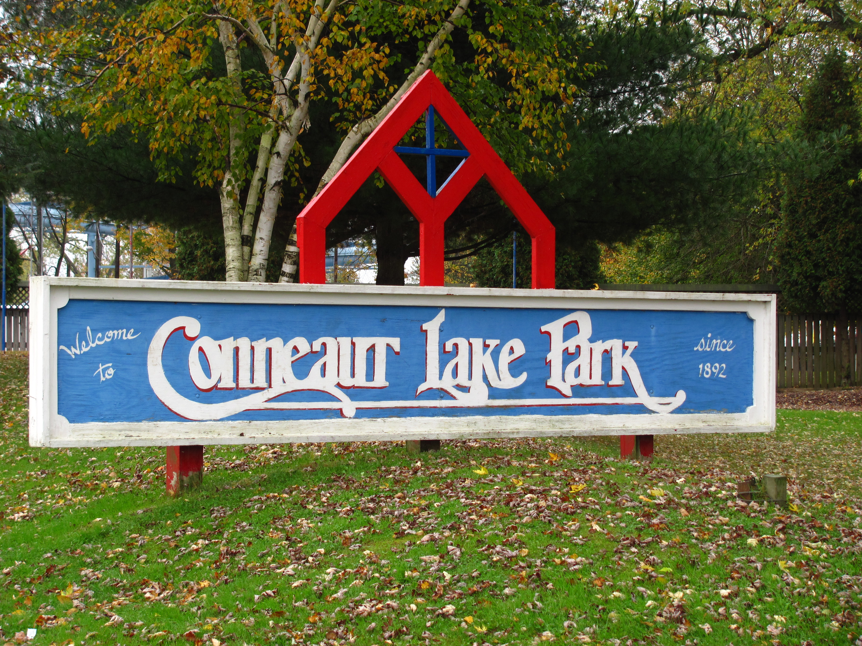 Park Marquee